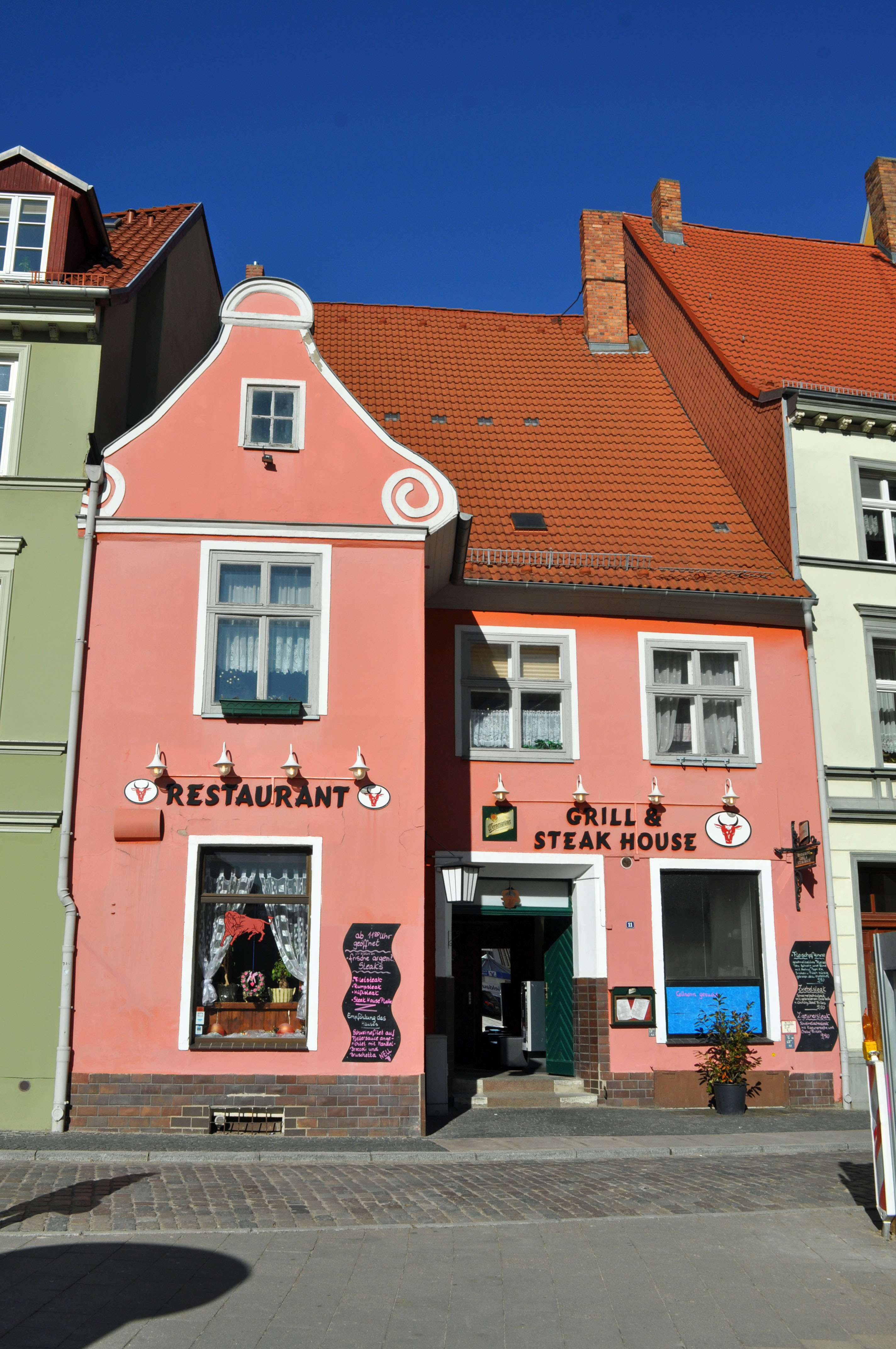 Gebäude bzw. Gebäudedetail in Stralsund. Straße und Hausnummer siehe Dateiname. Das Gebäude ist als Baudenkmal ausgewiesen, siehe dazu die Liste der Baudenkmale in Stralsund.